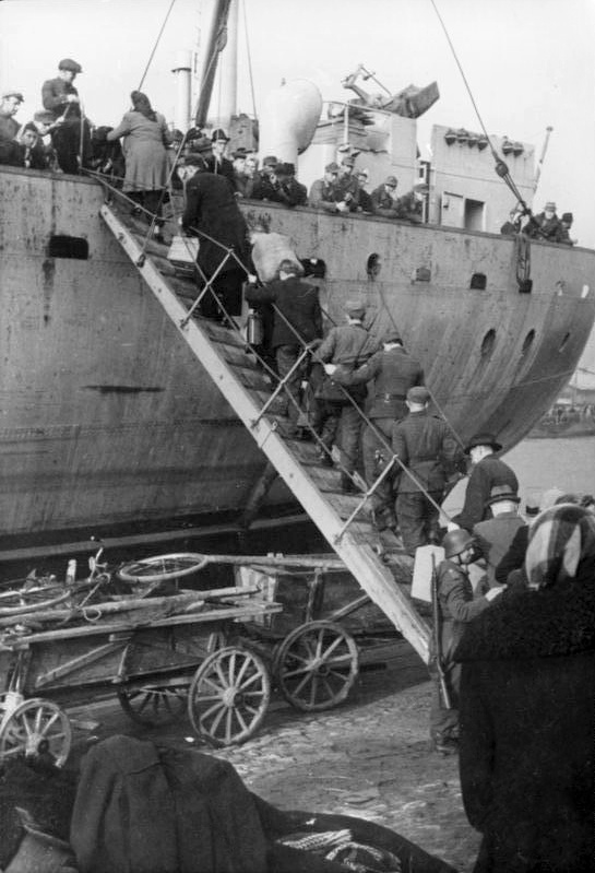 Kurland, Evakuierung aus Windau ADN-ZB/Archiv II. Weltkrieg 1939-45 In dem von den faschistischen deutschen Truppen besetzten Gebieten der Sowjetunion; Oktober 1944 Seit 10. Oktober 1944 sind durch die Rote Armee in Kurland (Kurzeme-Lettische SSR) 35 faschistische Divisionen abgeschnitten und bleiben bis Kriegsende blockiert. Deutsche Zivilisten und Wehrmachtsangehörige verlassen auf Schiffen den Hafen von Windau (lett. Ventspils). Aufnahme vom 19. 10. 1944 (Baier) [Scherl Bilderdienst]